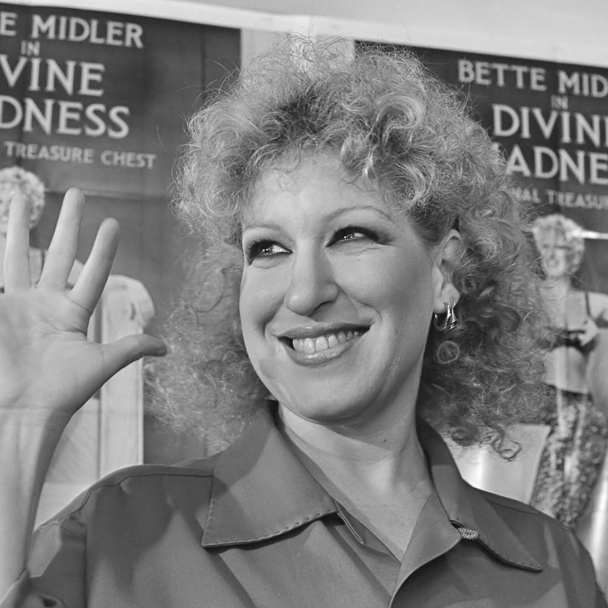 Bette Midler geeft een persconferentie in het city-theater in Amsterdam vanwege de film Divine Madness 24 januari 1981